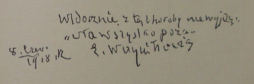 Апошнія напісаныя Эдвардам Адамавічам Вайніловічам (1847-1928) словы - у канцы рукапіса сваіх мемуараў, 8 чэрвеня 1928 г. Фота з кнігі першага тома мемуараў (1931 г.) Эдварда Вайніловіча.